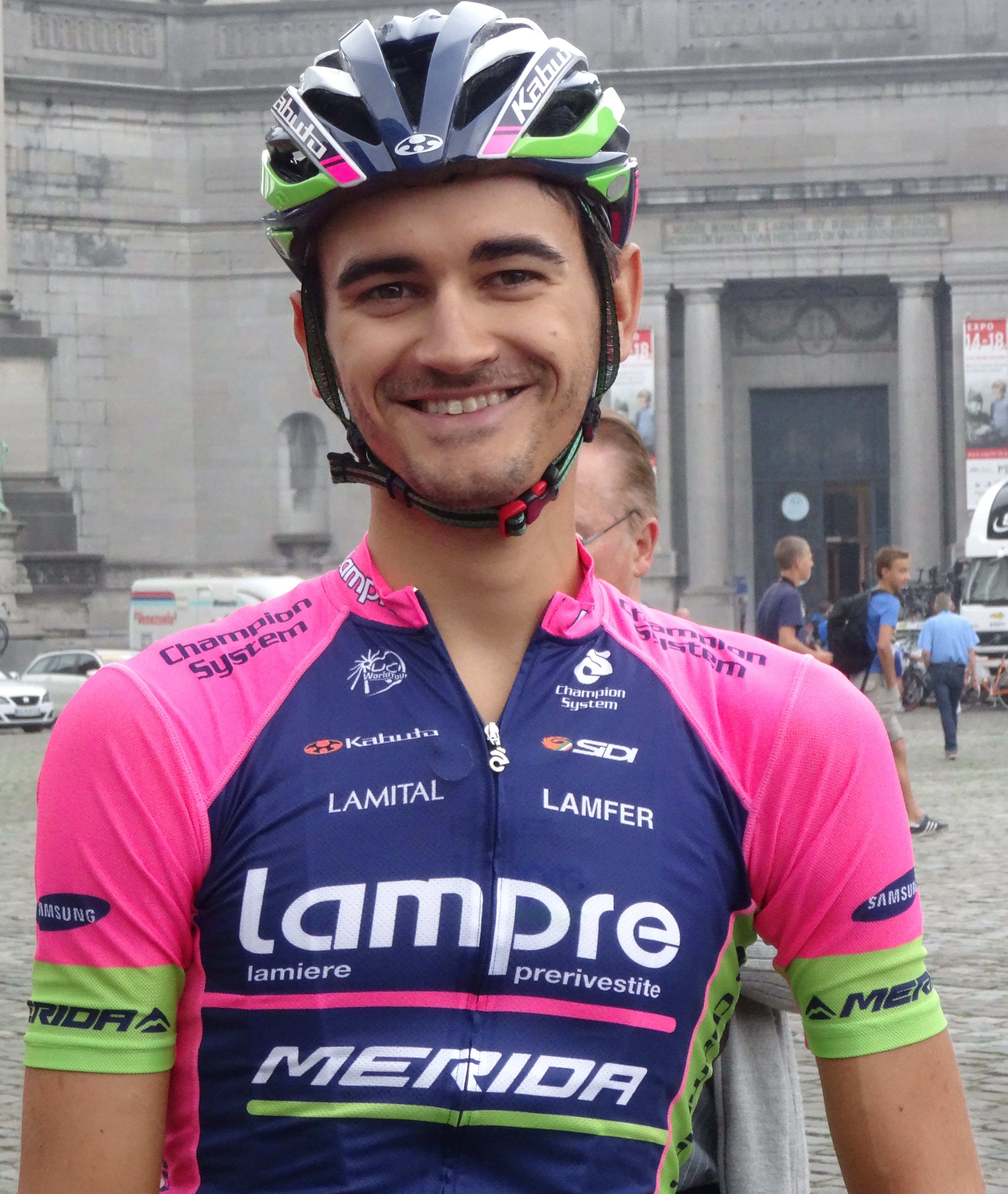 Brussels Cycling Classic 2014.